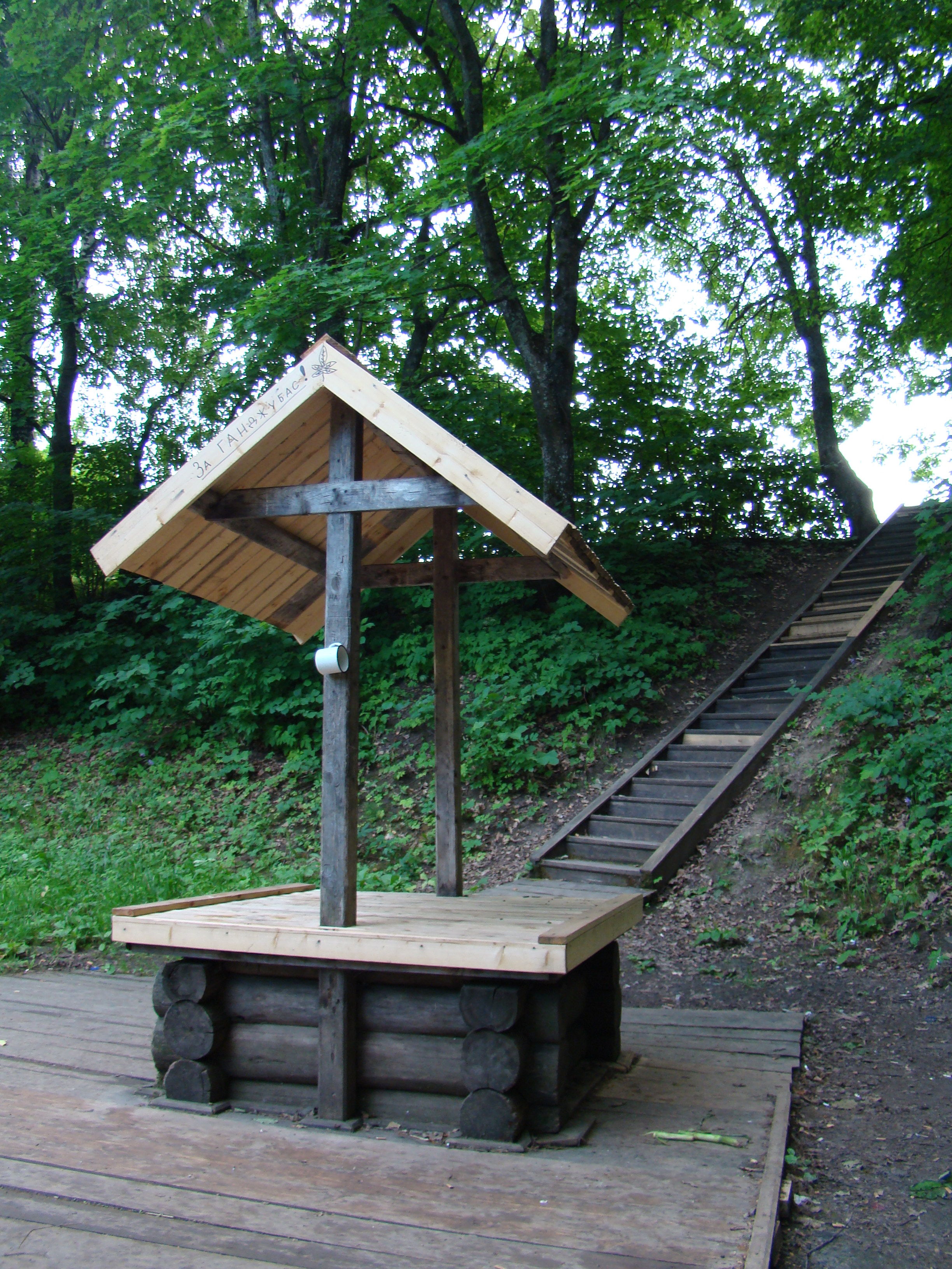 Большое Болдино. Родник в роще Лучинник.